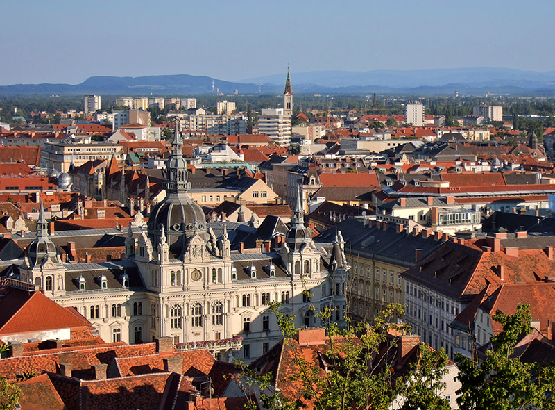 Rathaus in Graz